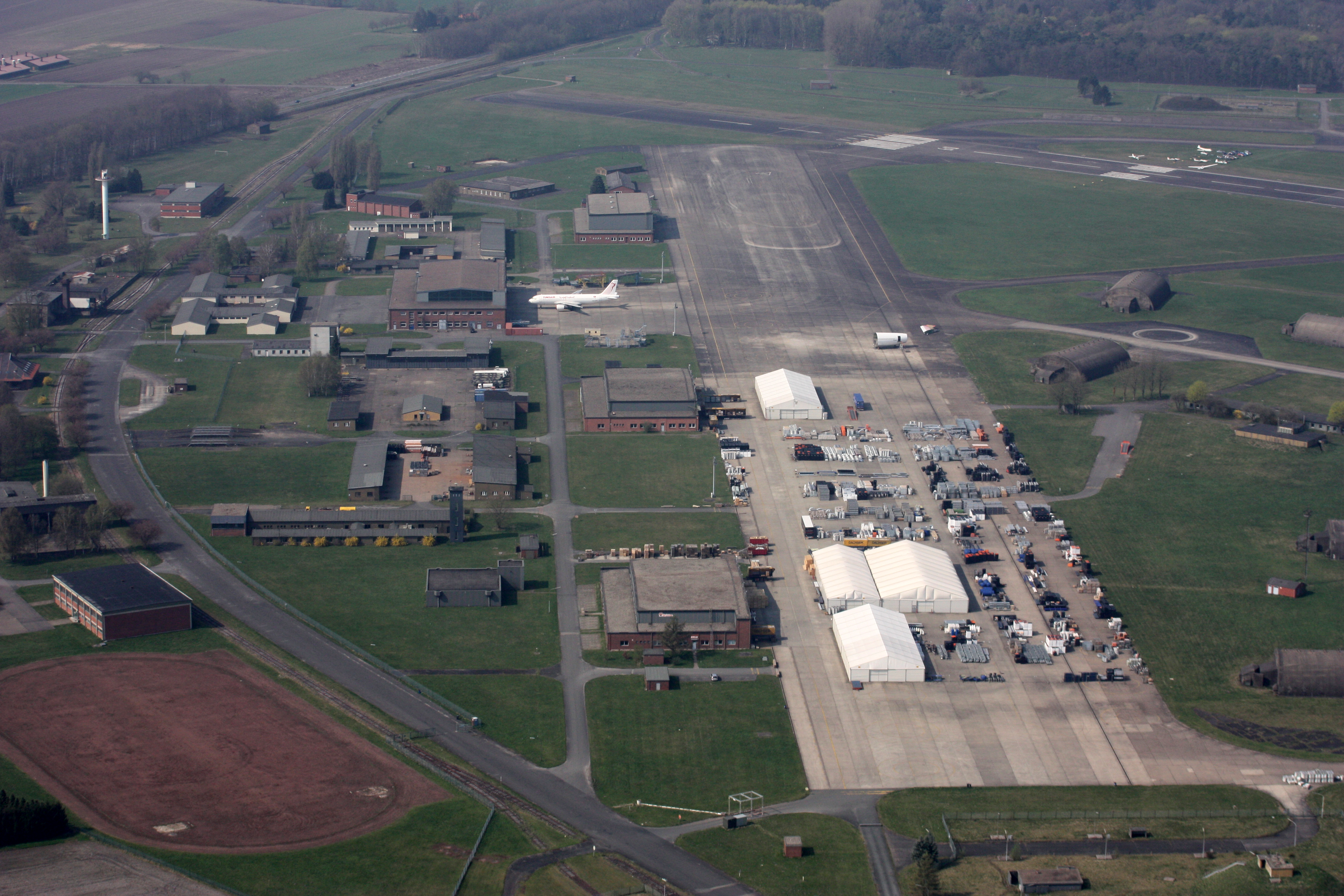 Dreieck Ahlhorner Heide und nähere Umgebung; östlich der A 29 vom Dreieck Richtung Oldenburg